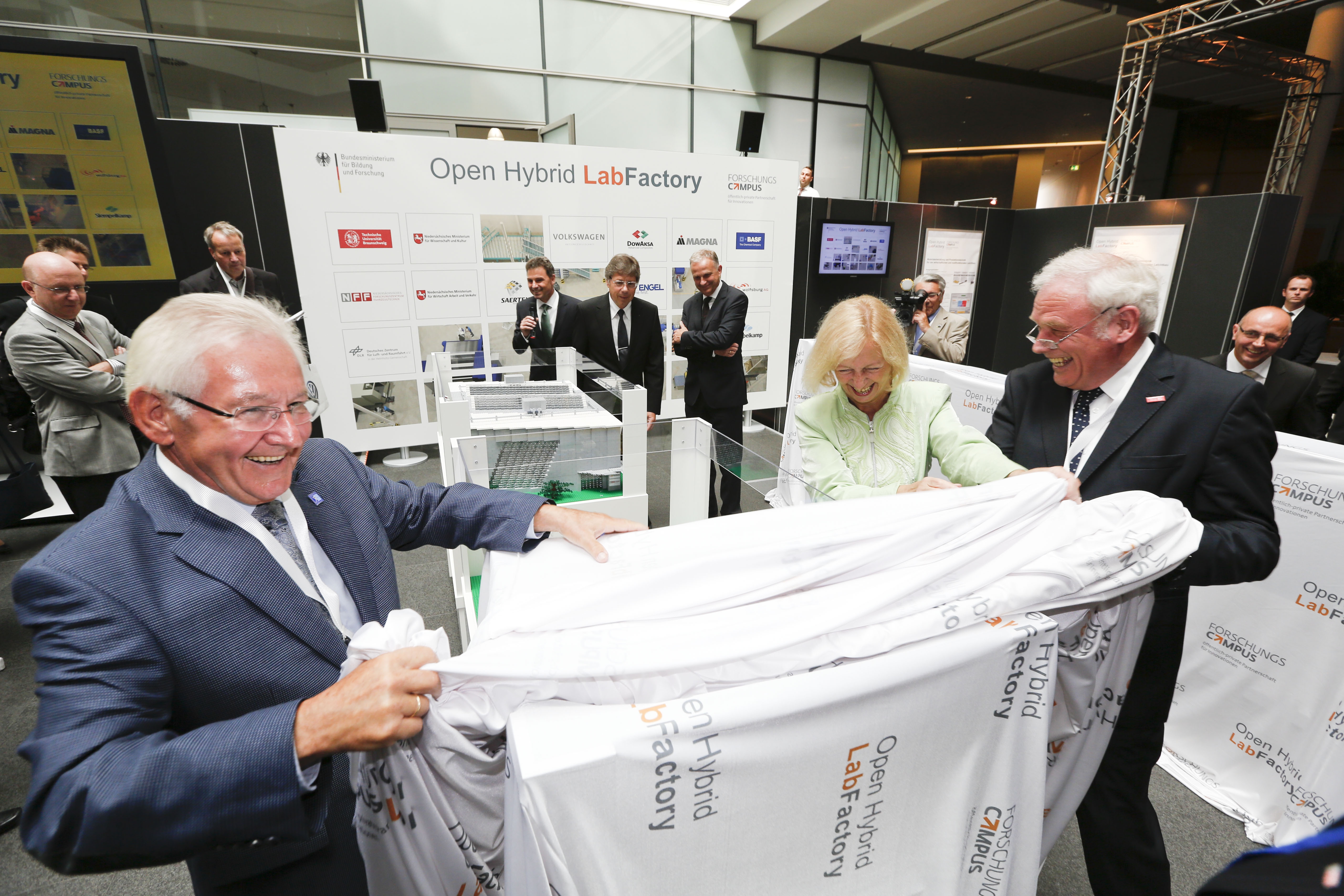 Startschuss OHLF